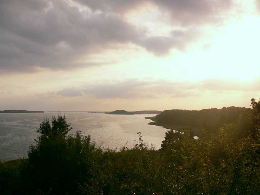 Greifswalder Bodden, Blick von Moritzburg bei Moritzdorf auf die Having, eine Bucht des Greifswalder Boddens